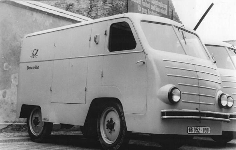 Zentralbild Funck 29.9.1953 Neue Fahrzeuge der Deutschen Post Im Postfuhramt in Berlin wurden 15 neue Spezial-Elektrowagen für den Briefkastenentleerungsdienst gezeigt, die am 1.10.53 von der Oberpostdirektion in Betrieb genommen werden. Die Wagen - eine Konstruktion von Ingenieur Rebbel- wurden bei IFA-Werdau gebaut und dienen vor allem dem Schutz des Fahrers, der nur nach rechts aussteigen kann und auch vor Witterungseinflüssen geschätzt ist.